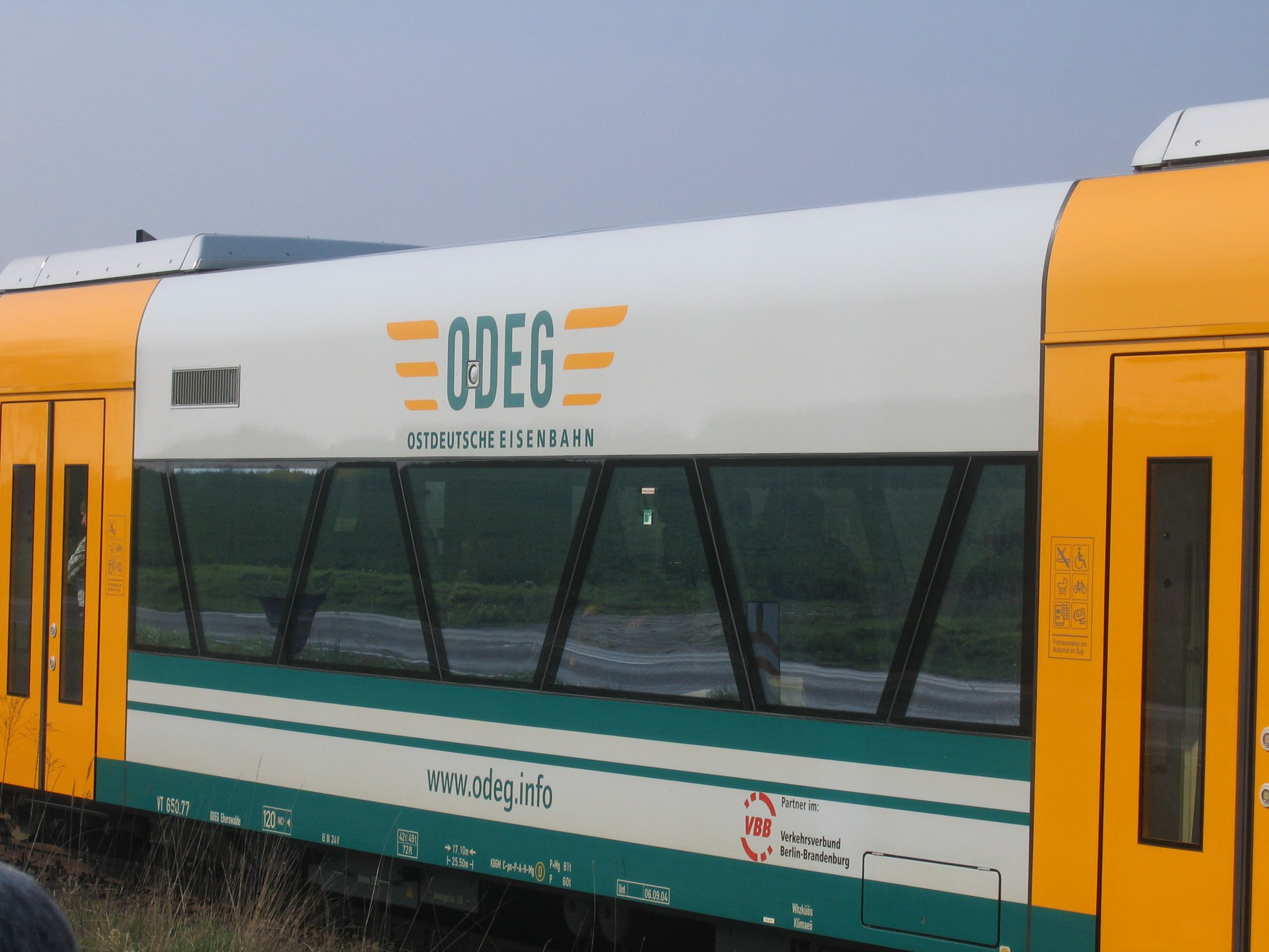 Beschriftung der Ostdeutschen Eisenbahn GmbH (ODEG) auf einem Stadler Regio-Shuttle RS1